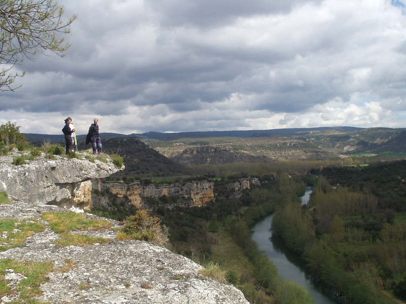 Valle de Manzanedo y río Ebro desde Vallejo y más concretamente en un punto conocido como San Vicente